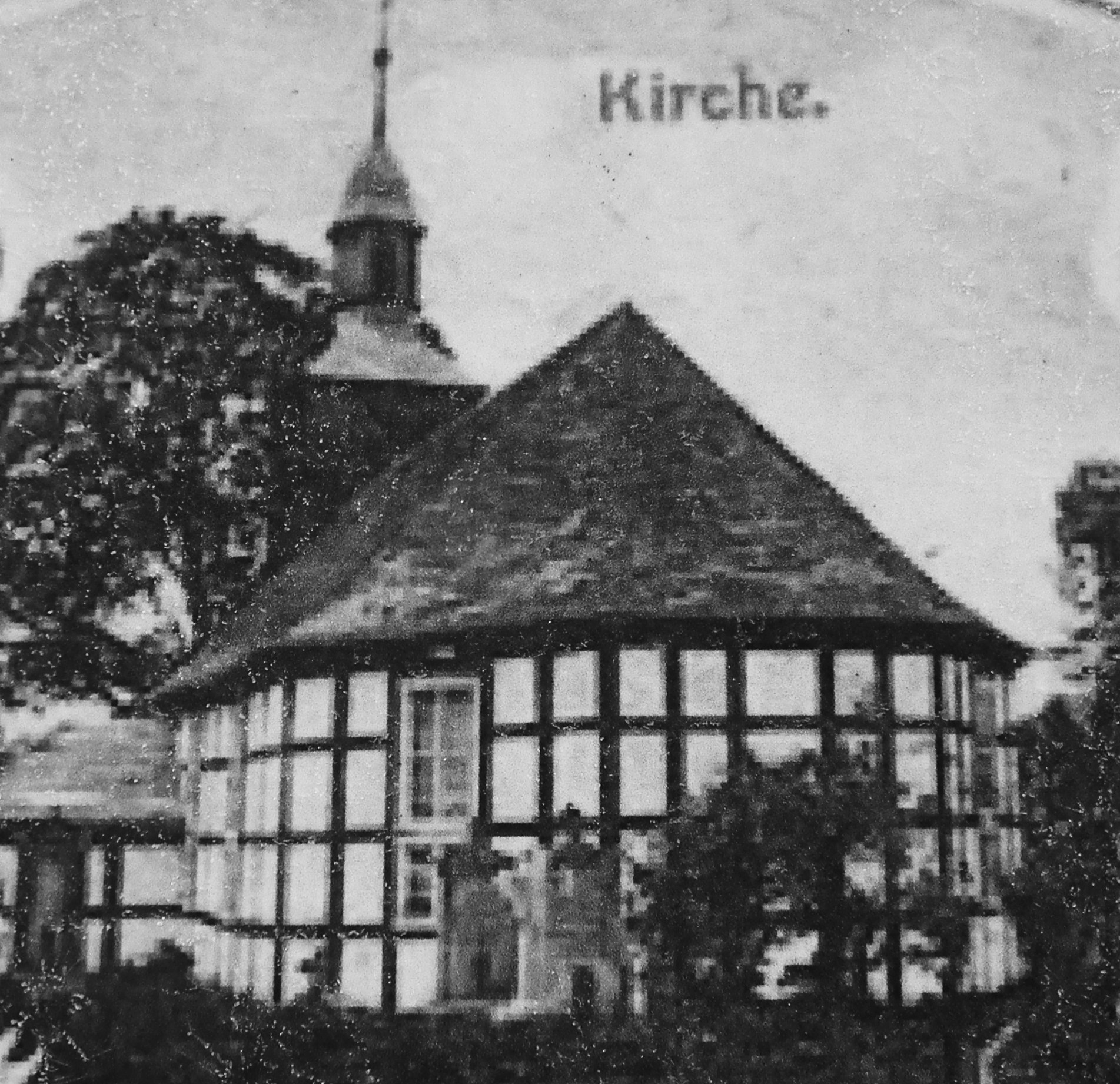 Kościół w Zwierzynie na starej pocztówce (pocz. XX w.). Konstrukcja była wówczas ryglowa.